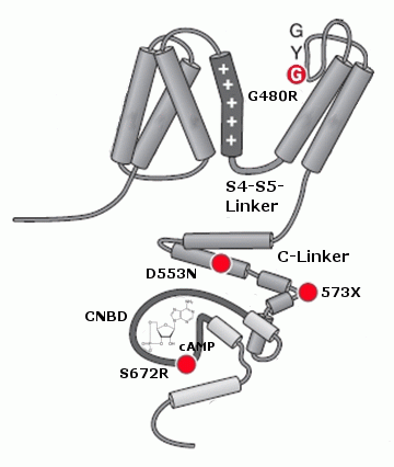 Struktur eines HCN-Kanals, abgebildet ist eine Untereinheit mit sechs Transmembrandomänen und dem intrazellulären C-Terminus. Das S4-Segment enthält den Spannungssensor. Bekannte pathophysiologisch relevante Mutationen werden mit roten Punkten und der betroffenen Aminosäure dargestellt (modifiziert nach M. Biel et al.: Hyperpolarization-activated cation channels: from genes to function. In: Physiological reviews 89(3), Juli 2009, S. 847-885, PMID 19584315)